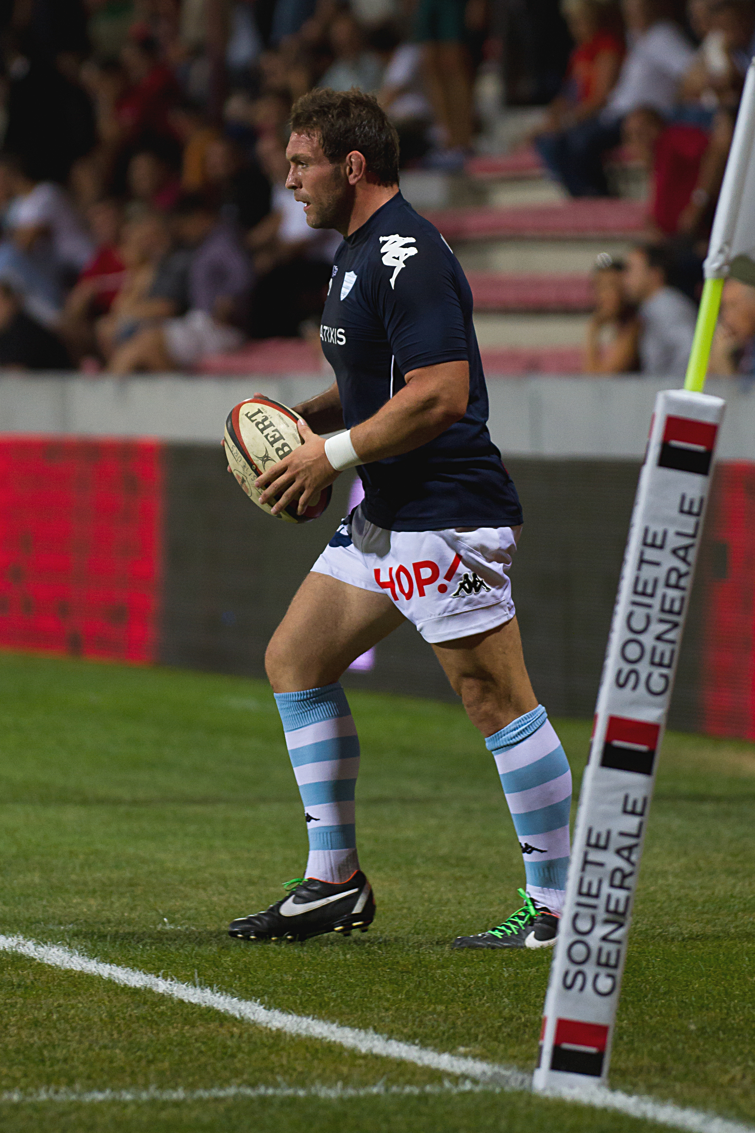 Dimitri Szarzewski à l'échauffement avant Stade toulousain vs Racing Metro 92, le 5 septembre 2013.